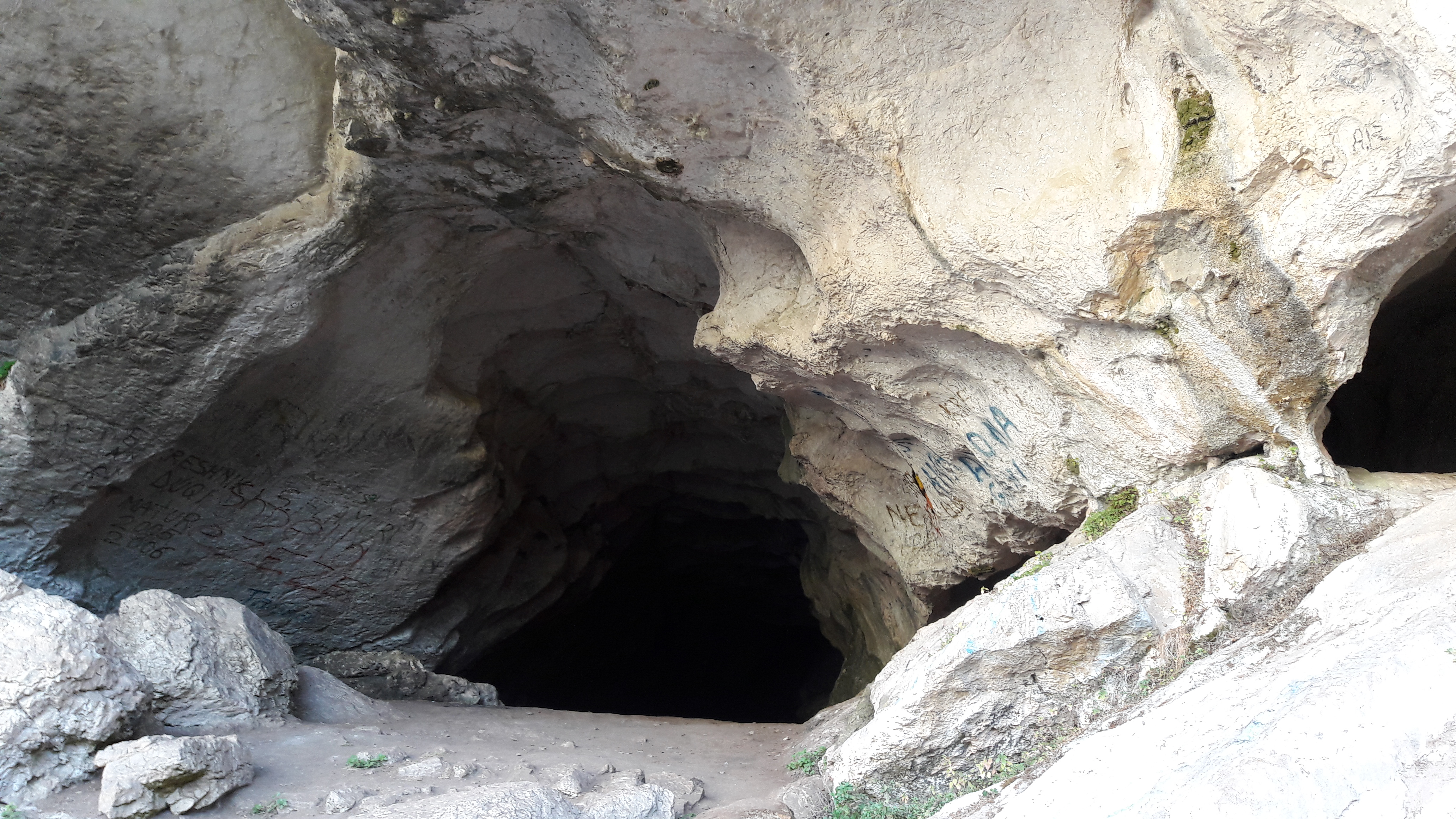 Shpella e Pëllumbasit, Tiranë